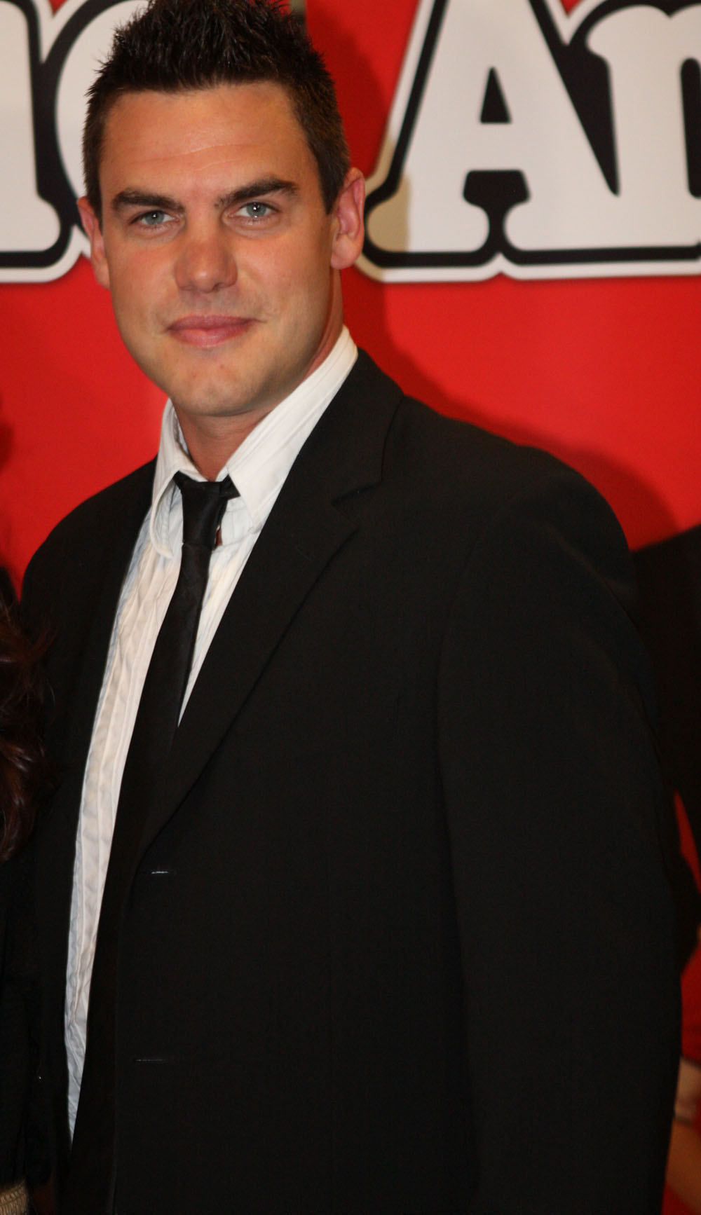 Ben Mingay